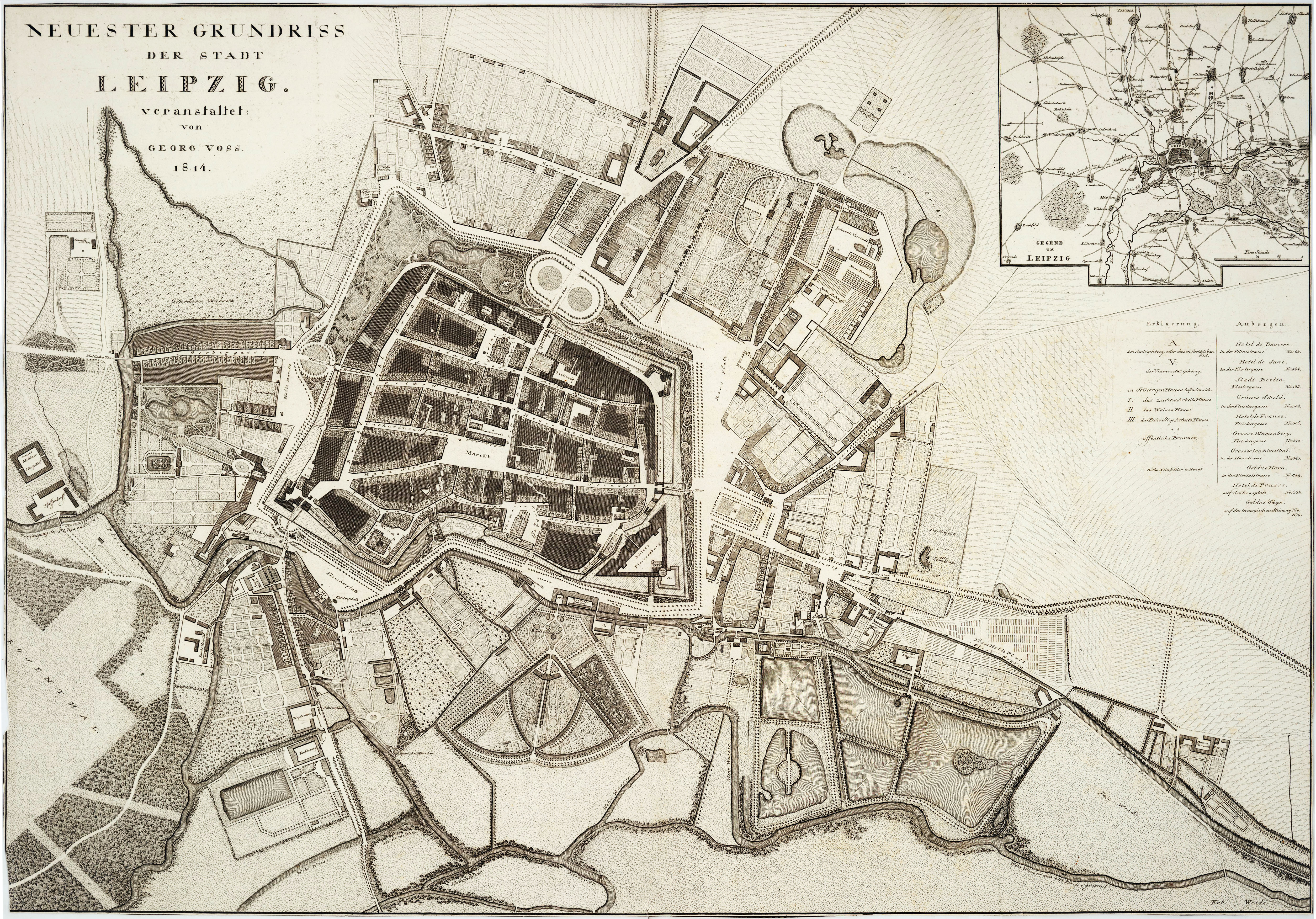 Neuester Grundriss der Stadt Leipzig. Veranstaltet: von Georg Voss. 1814. Kupferstich 74 × 52 cm, ca. 1:4.800